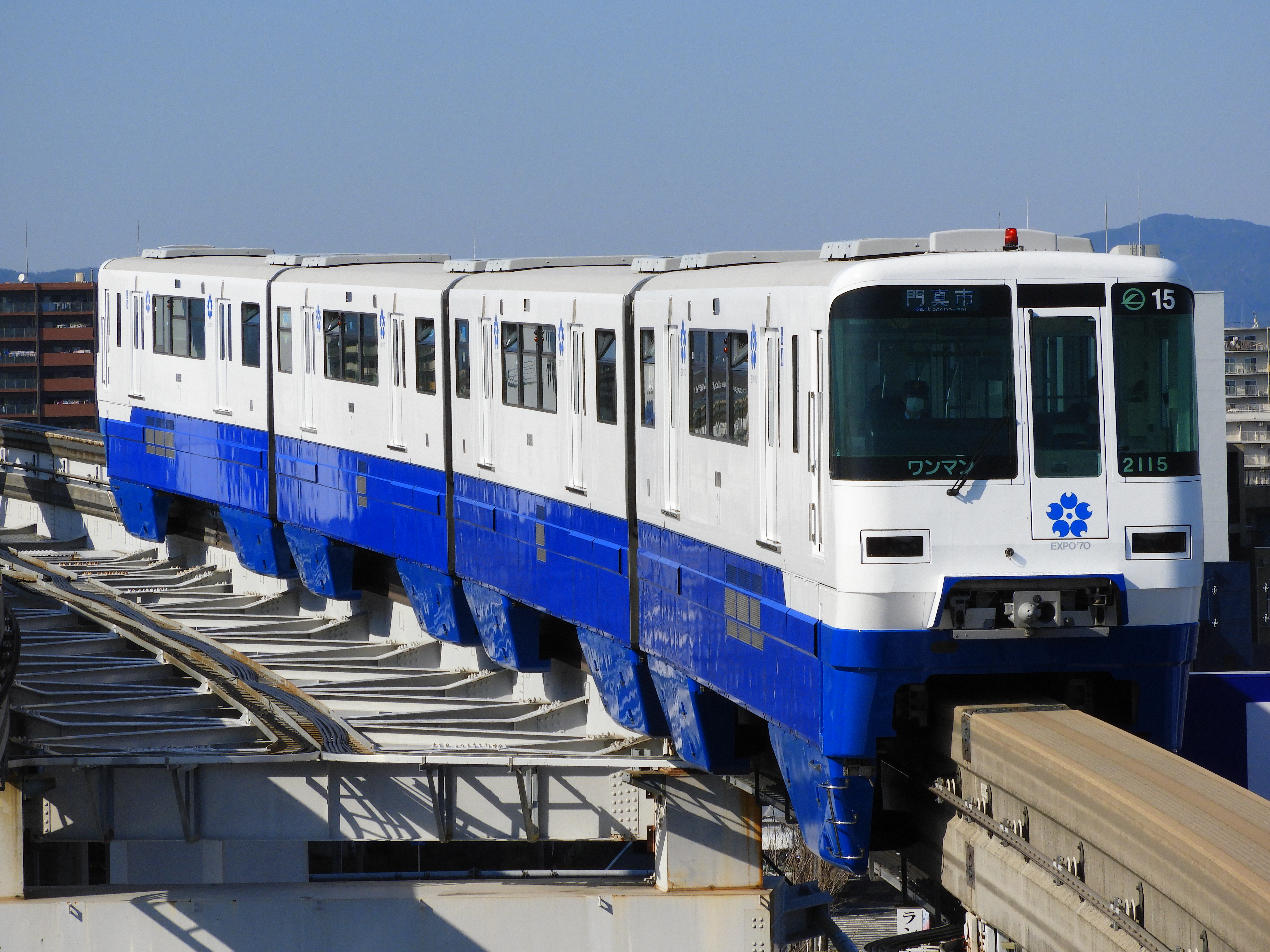 大阪モノレール2000系2115F 「EXPO'70」ラッピング 沢良宜駅にて